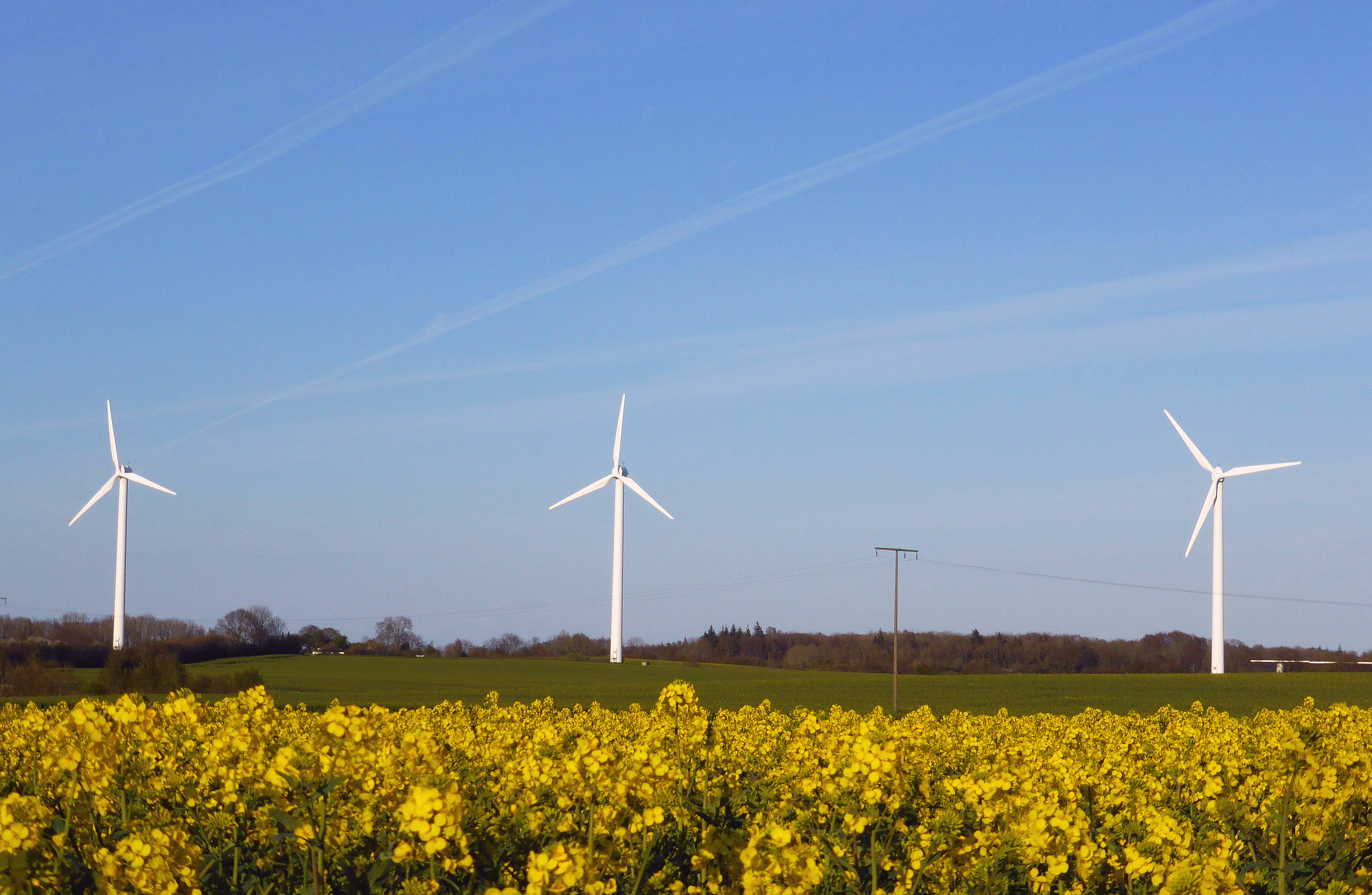 Energiegewinnung 3 Windkraftanlagen Steinberg Ostsee Foto 2014 Wolfgang Pehlemann P1060279